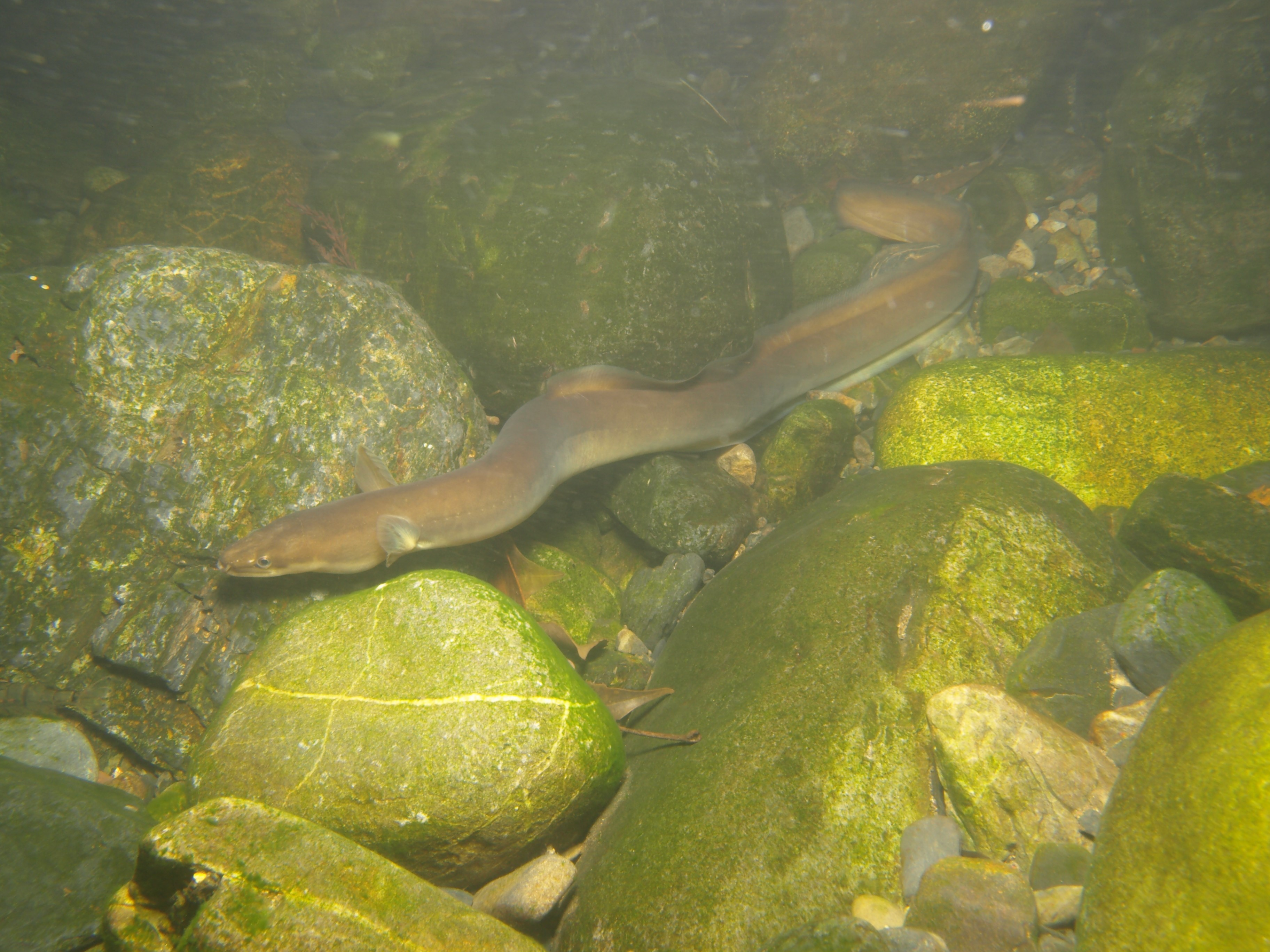 夜間、活発に泳ぎ回るニホンウナギ（屋久島の小河川河口域）。詳細